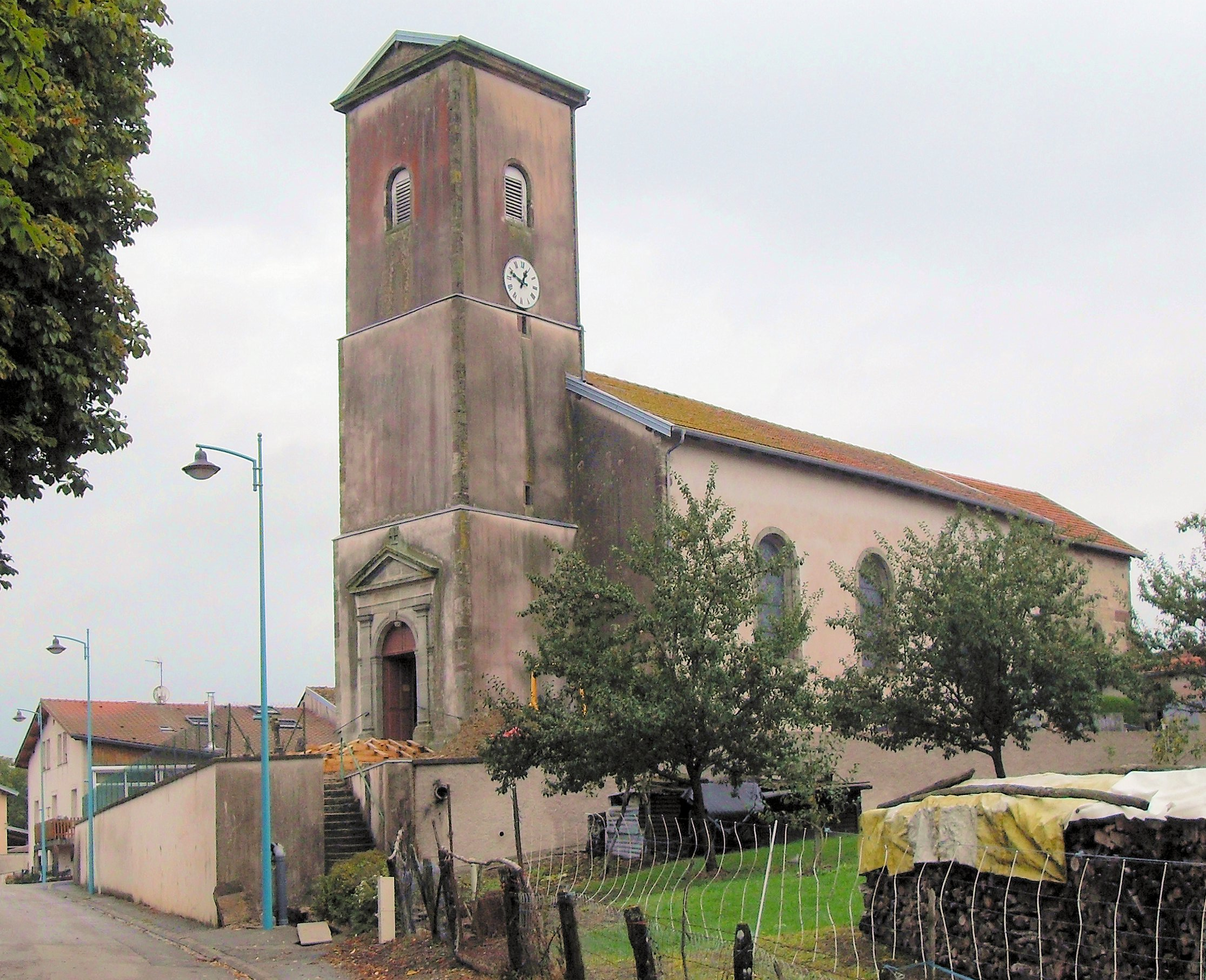 L'église Saint-Hilaire de Hagécourt, côté sud